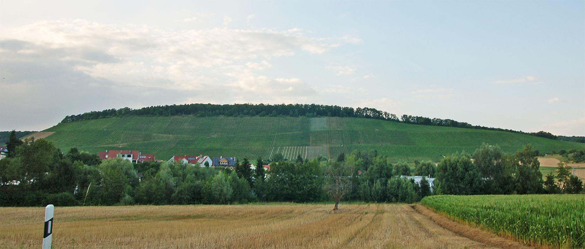 Flurbereinigte Rebhänge an der Südabdachung des Baiselsbergs über Horrheim